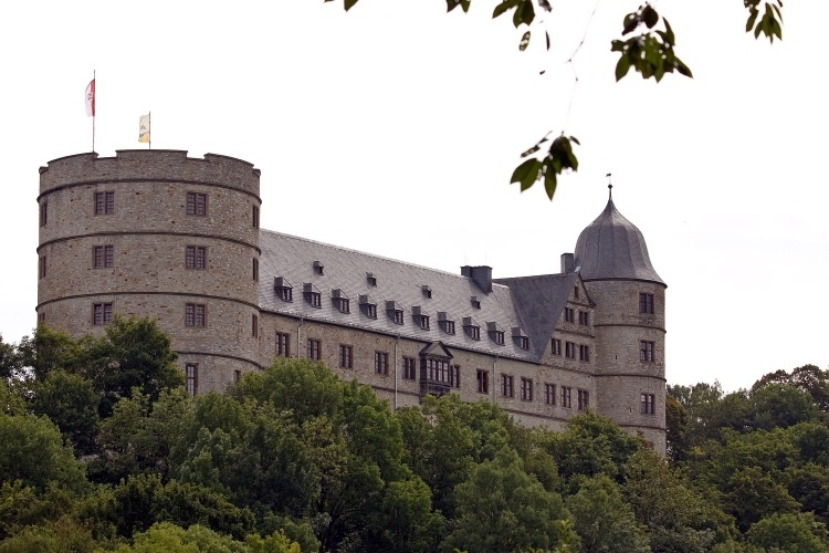 Blick vom Almetal zur Wewelsburg